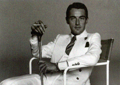 Lo stilista Walter Albini (1941-1983), anni sessanta-settanta.